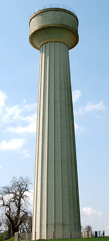 chateau d'eau de Lorigné